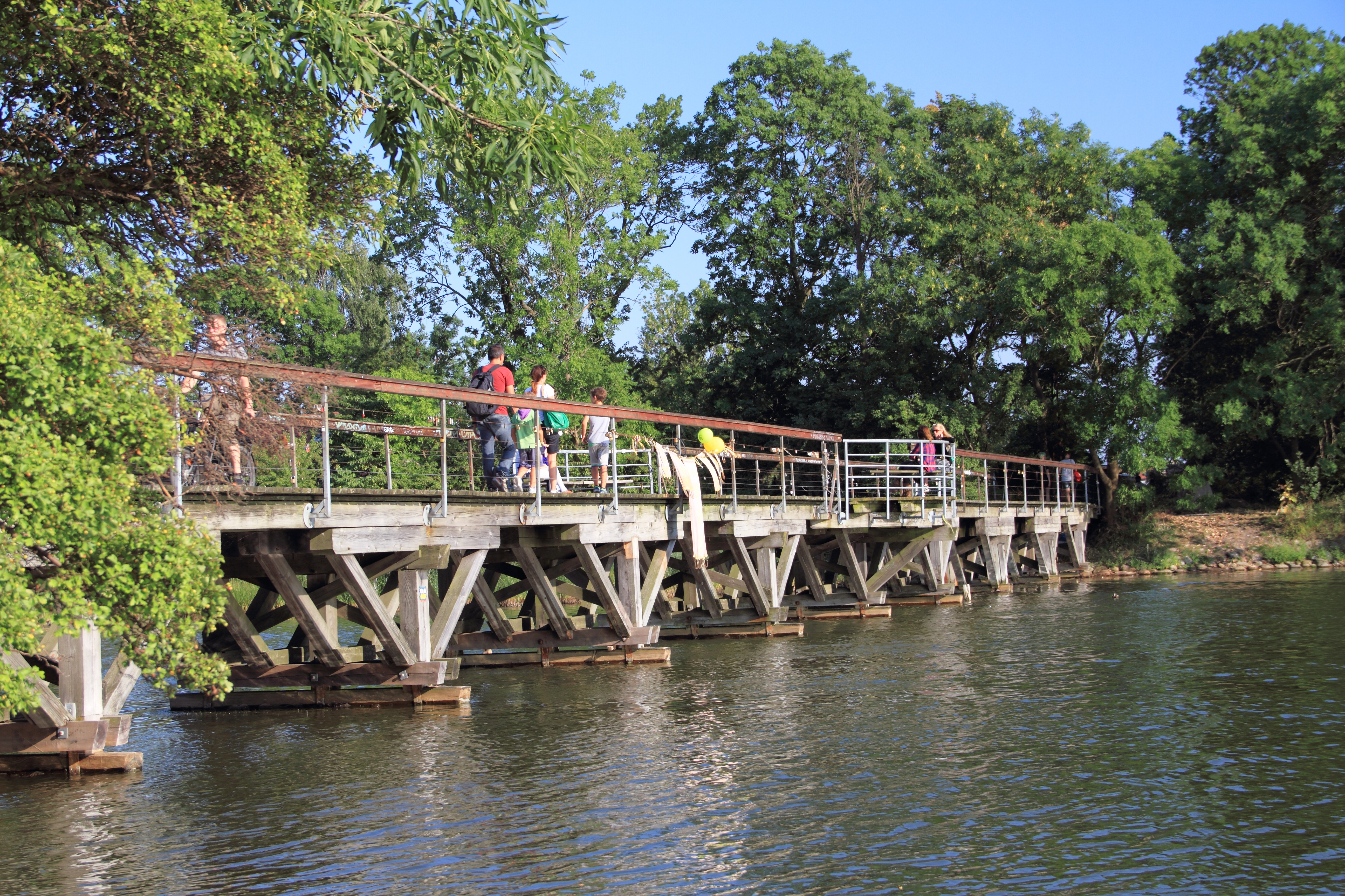 In der Freistadt Christiania im Sommer 2015.